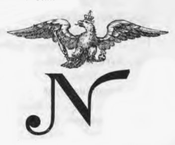 Altes Siegel bzw. Stempel der Gemeinde Königlich Neudorf im Kreis Oppeln.